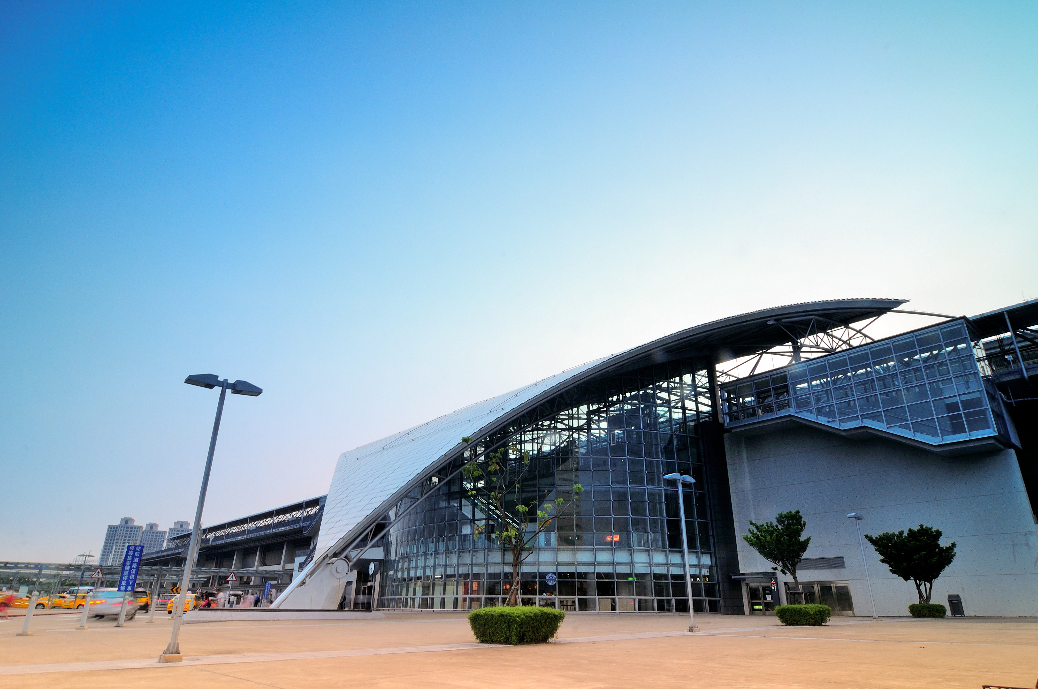 臺灣高鐵新竹車站。